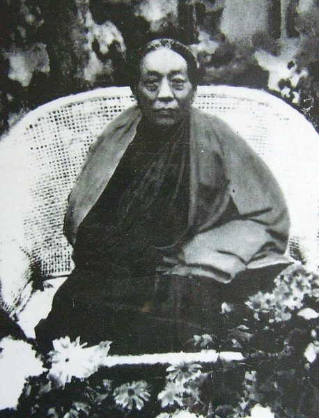 諾那呼圖克圖